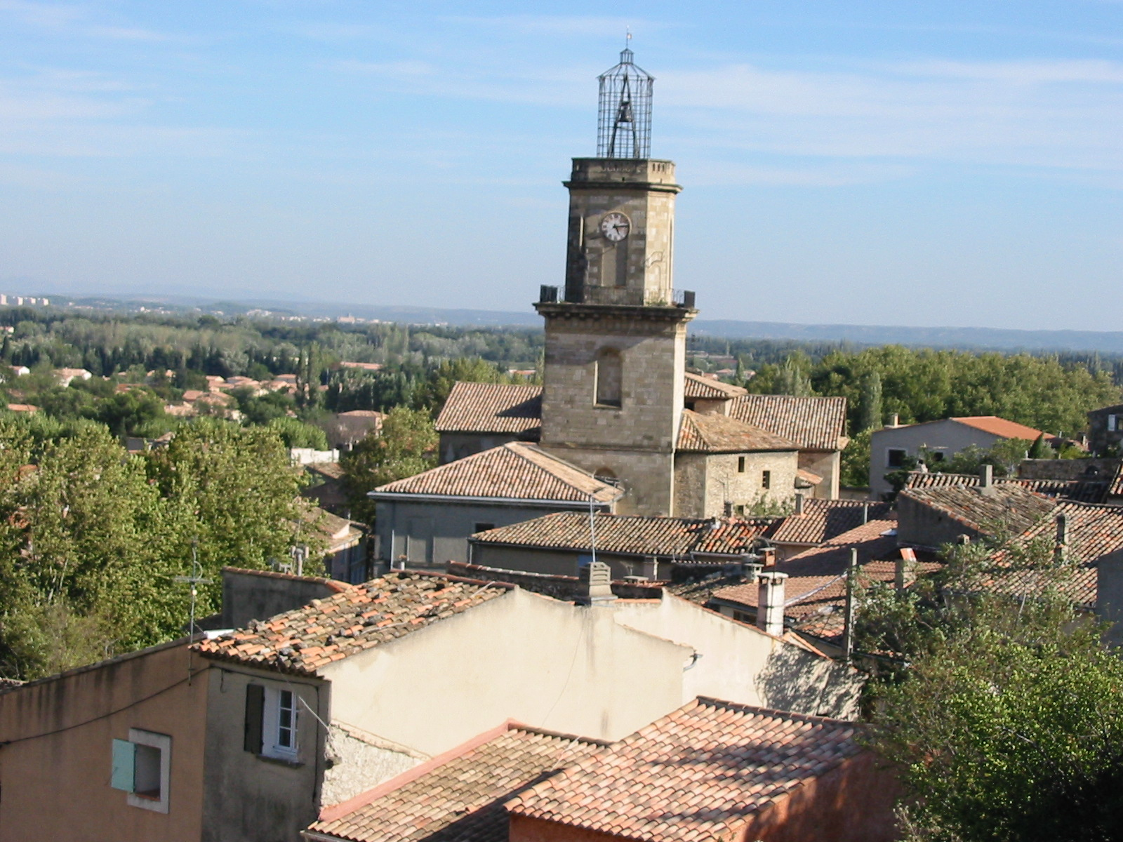 Vue générale du village d'Eyguières.